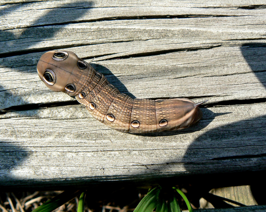 Xylophanes tersa; chenille; caterpillar